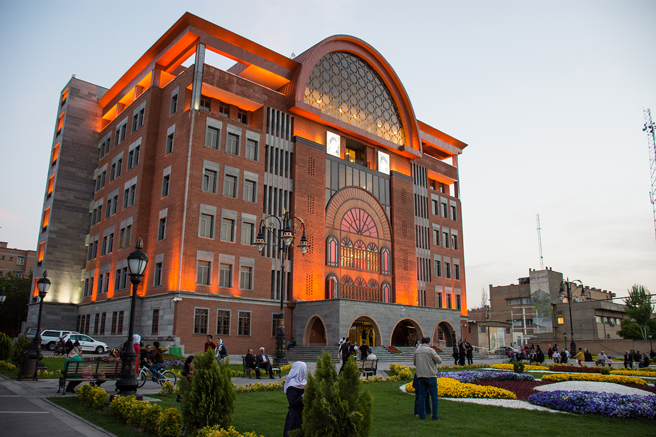 ساختمان مرکزی شهرداری تبریز